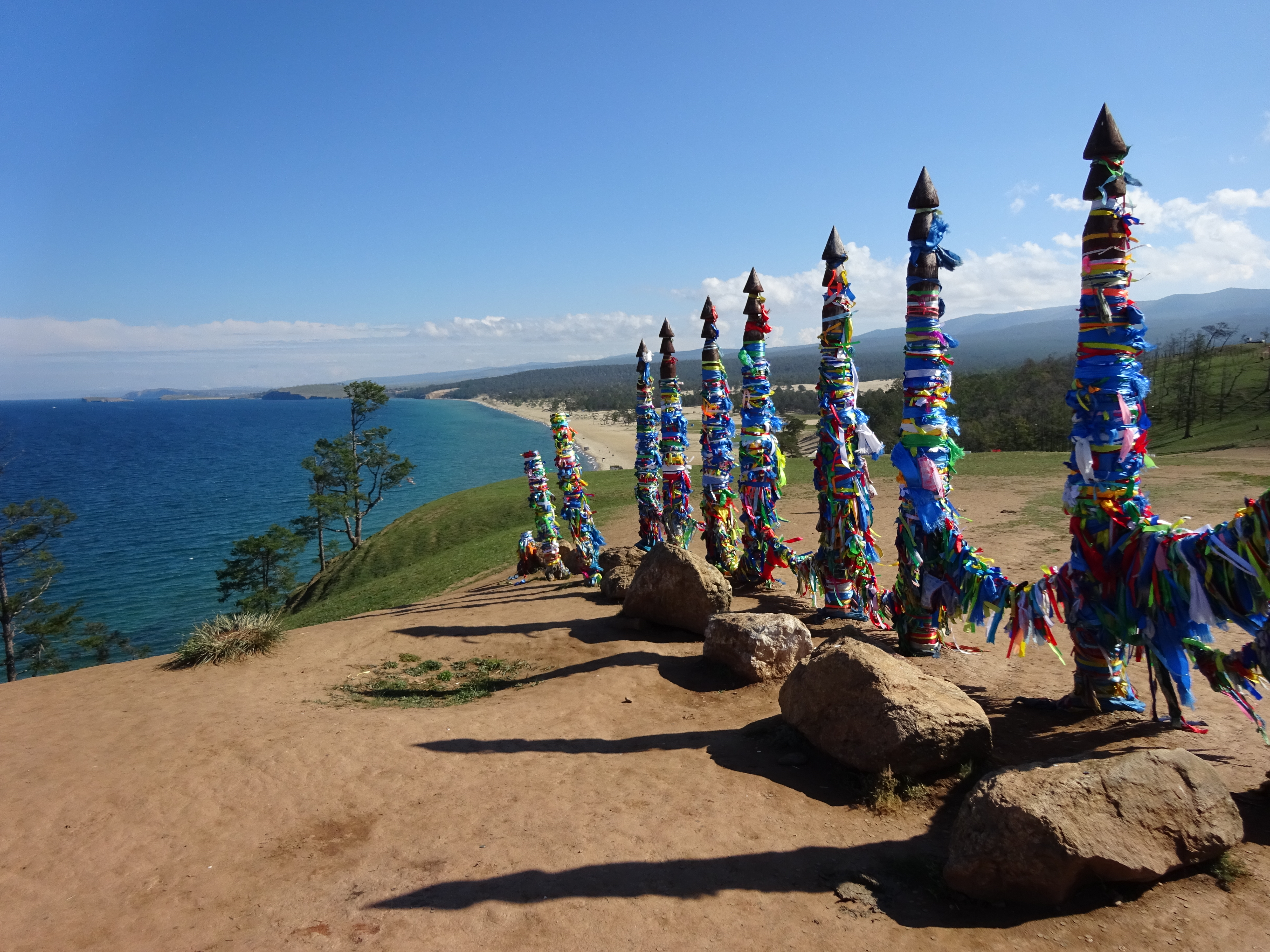 Мыс Бурхан (Скала Шаманка): о. Ольхон Прибайкальский национальный парк Поселок Хужир (координаты N 53 12 234 E 107 20 328), Ольхонский район, Иркутская область This image is related to the protected area of Russia number 3810274